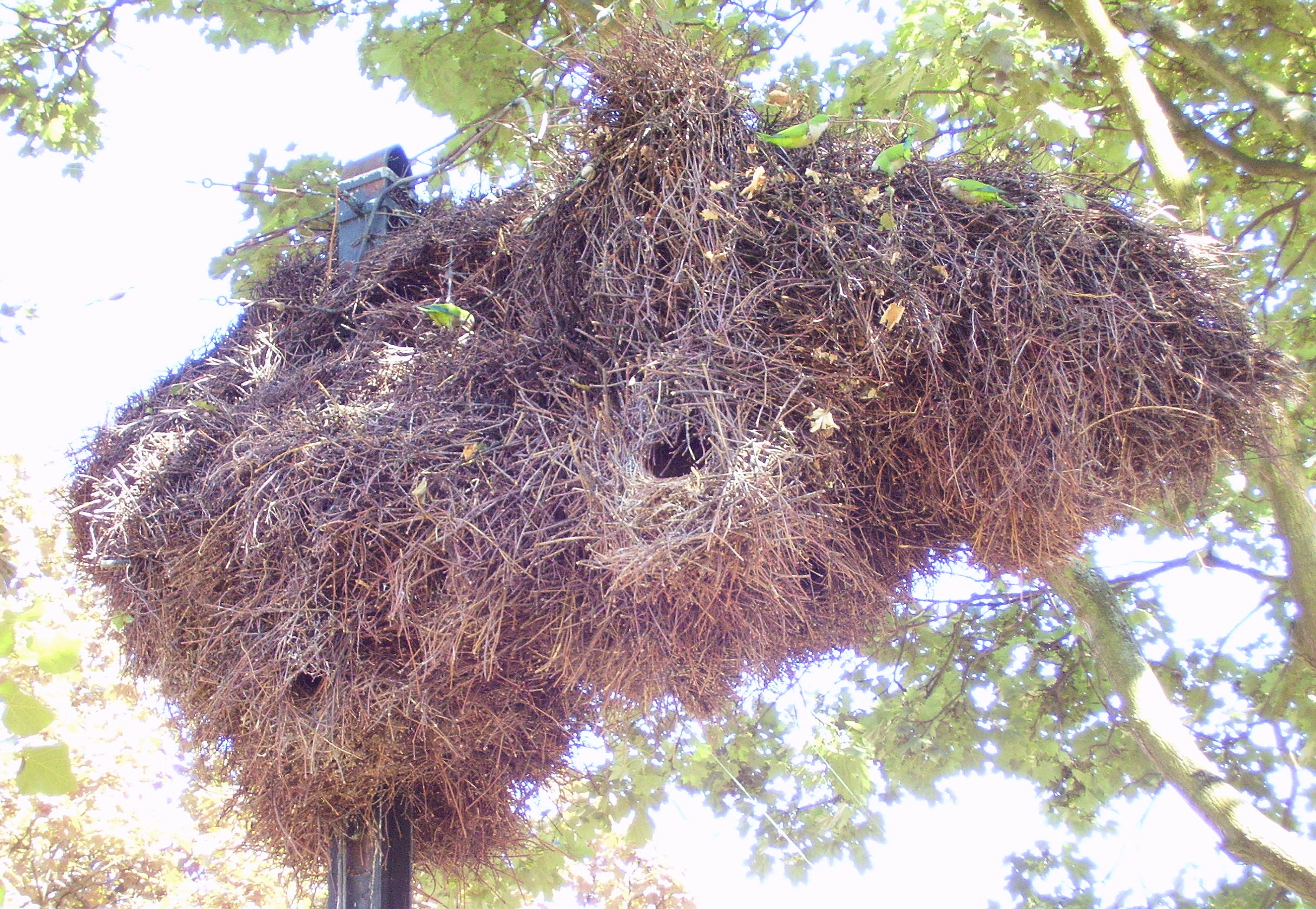 Description: Perriche Jeune veuve - l'un des nids collectifs de la place d'Arrezo, à Ixelles (Bruxelles)- 29 juillet 2006 Author: User:Ben2 Date of creation:29 juillet 2006 Source: Photo personnelle